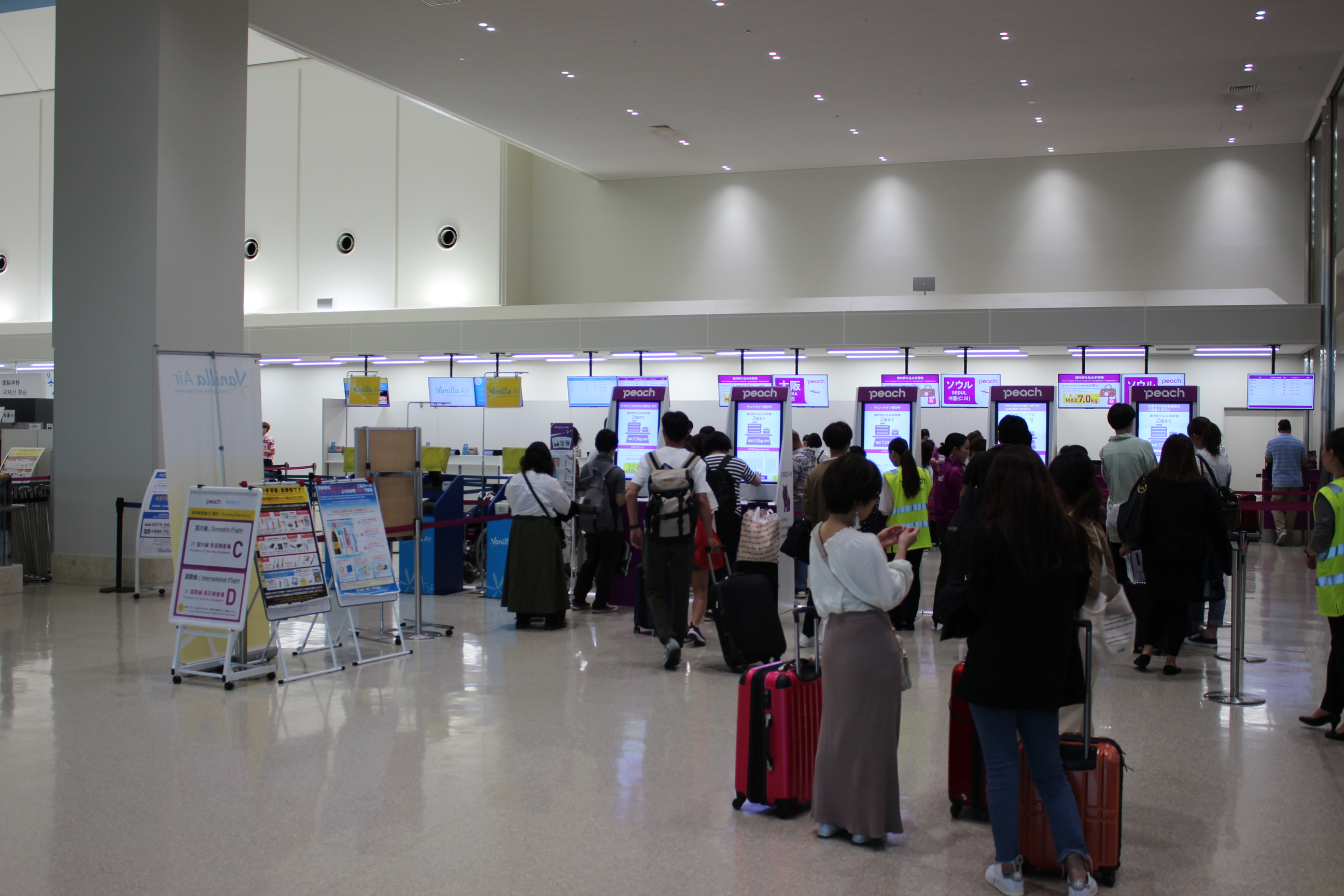 那覇空港際内連結ターミナル・チェックインカウンター